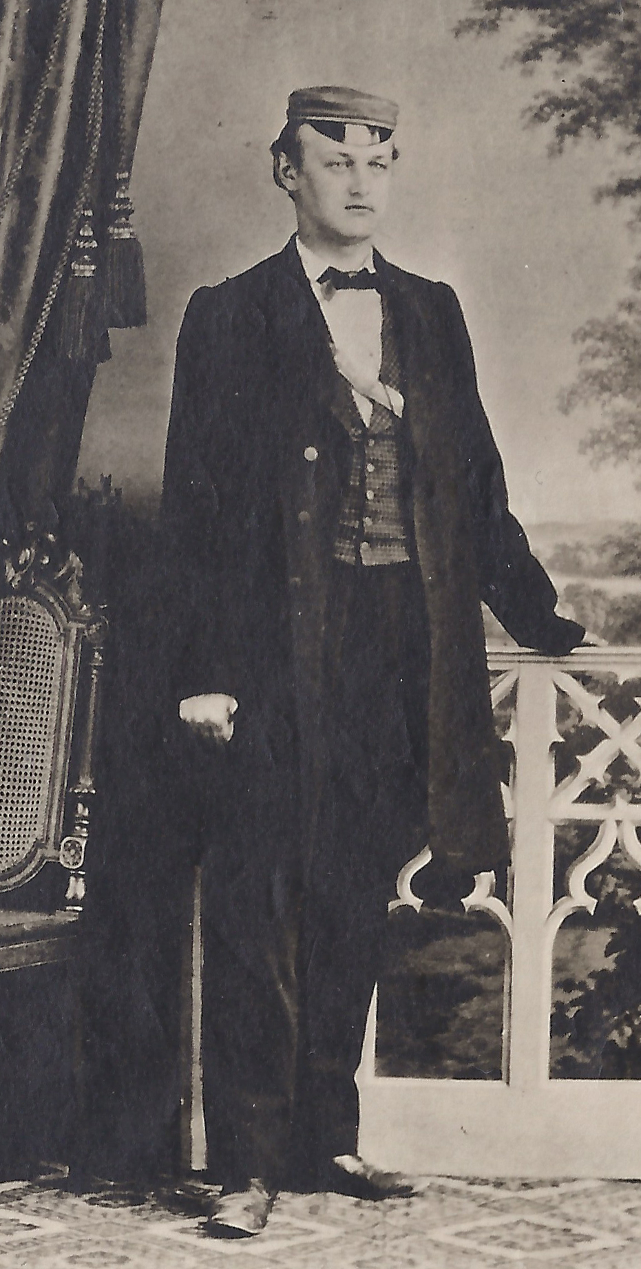 Fotografie von Emil Munz, Vorsitzender des Kösener Congress 1861, Ehrenmitglied des Corps Lusatia Leipzig